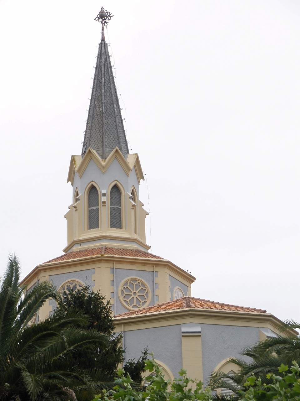 Abadía trapense de Santa María de Viaceli, en Cóbreces (Cantabria)